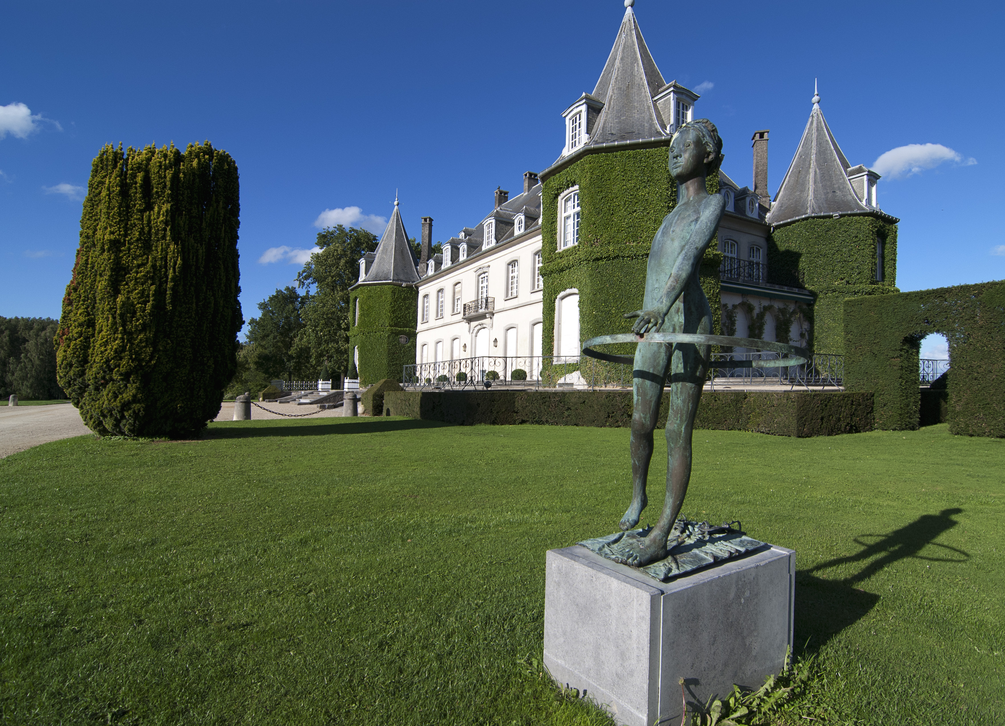 Le château de La Hulpe est situé dans la commune de La Hulpe en Région wallonne, Belgique.